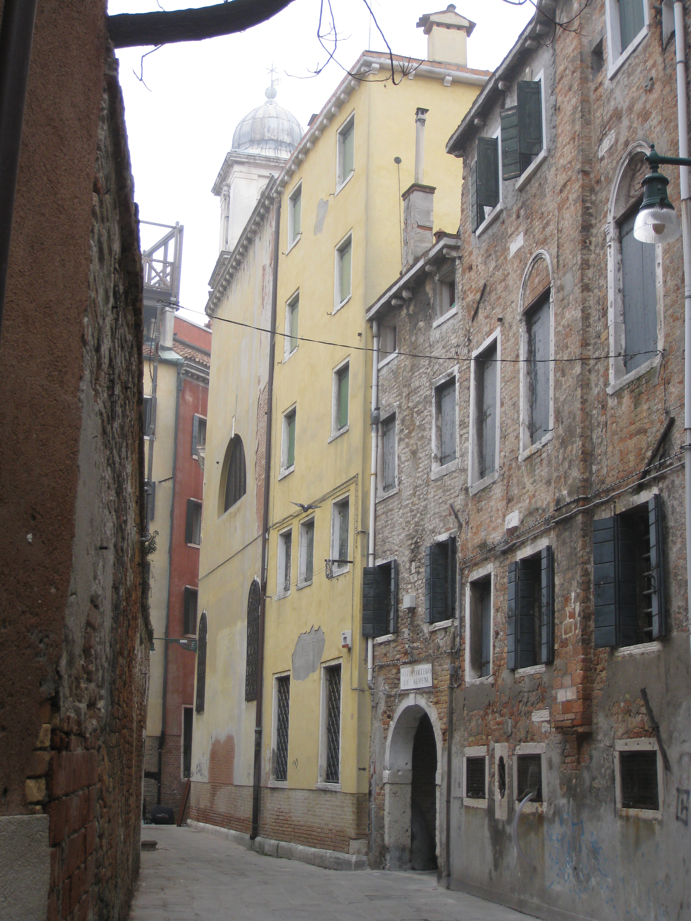 Venezia - Chiesa di Santa Croce degli Armeni